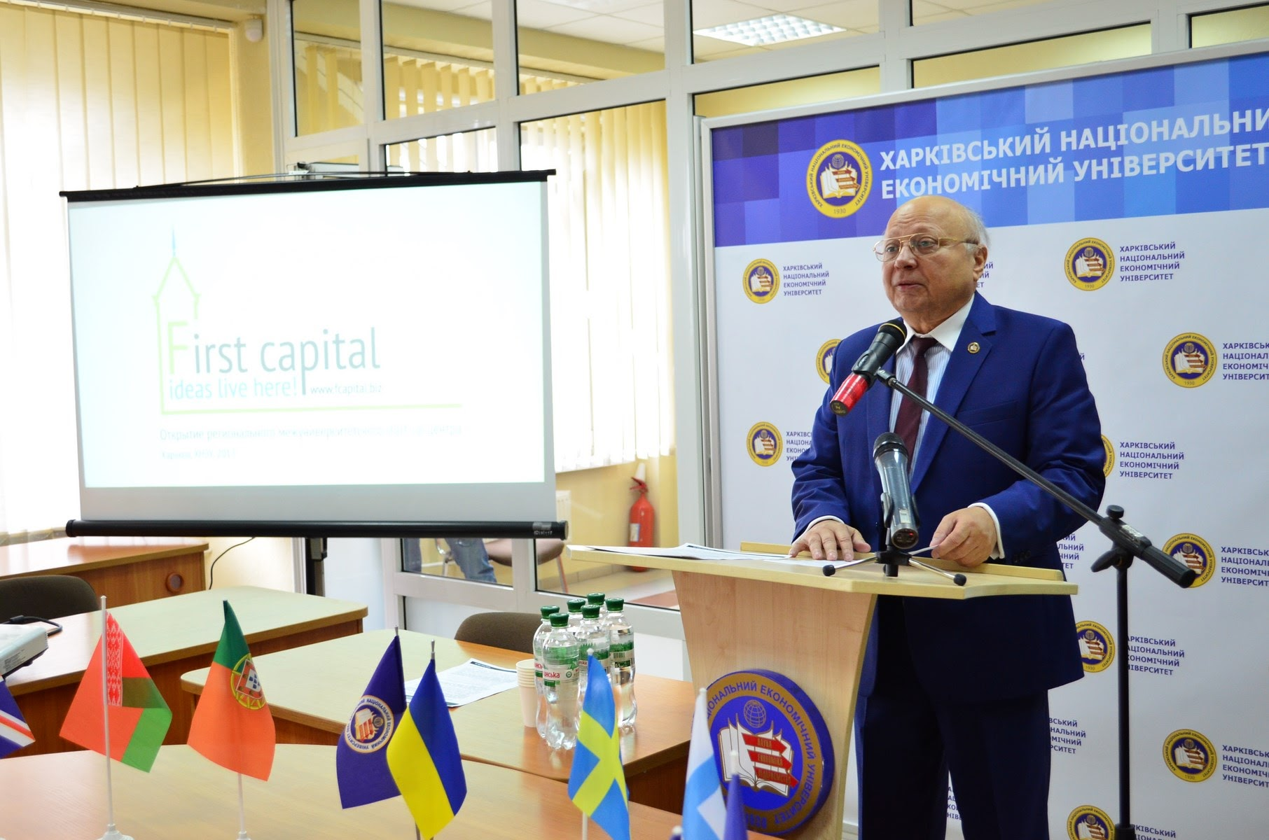 Ректор Харківського національного економічного університету імені Семена Кузнеця Володимир Пономаренко відкриває в університеті Startup-центр “First Capital”. 15 жовтня 2013 року.